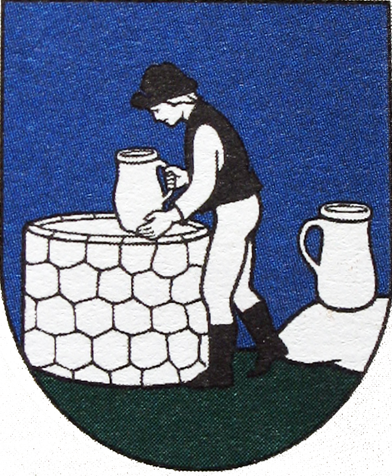 Erb obce Vyšný Mirošov